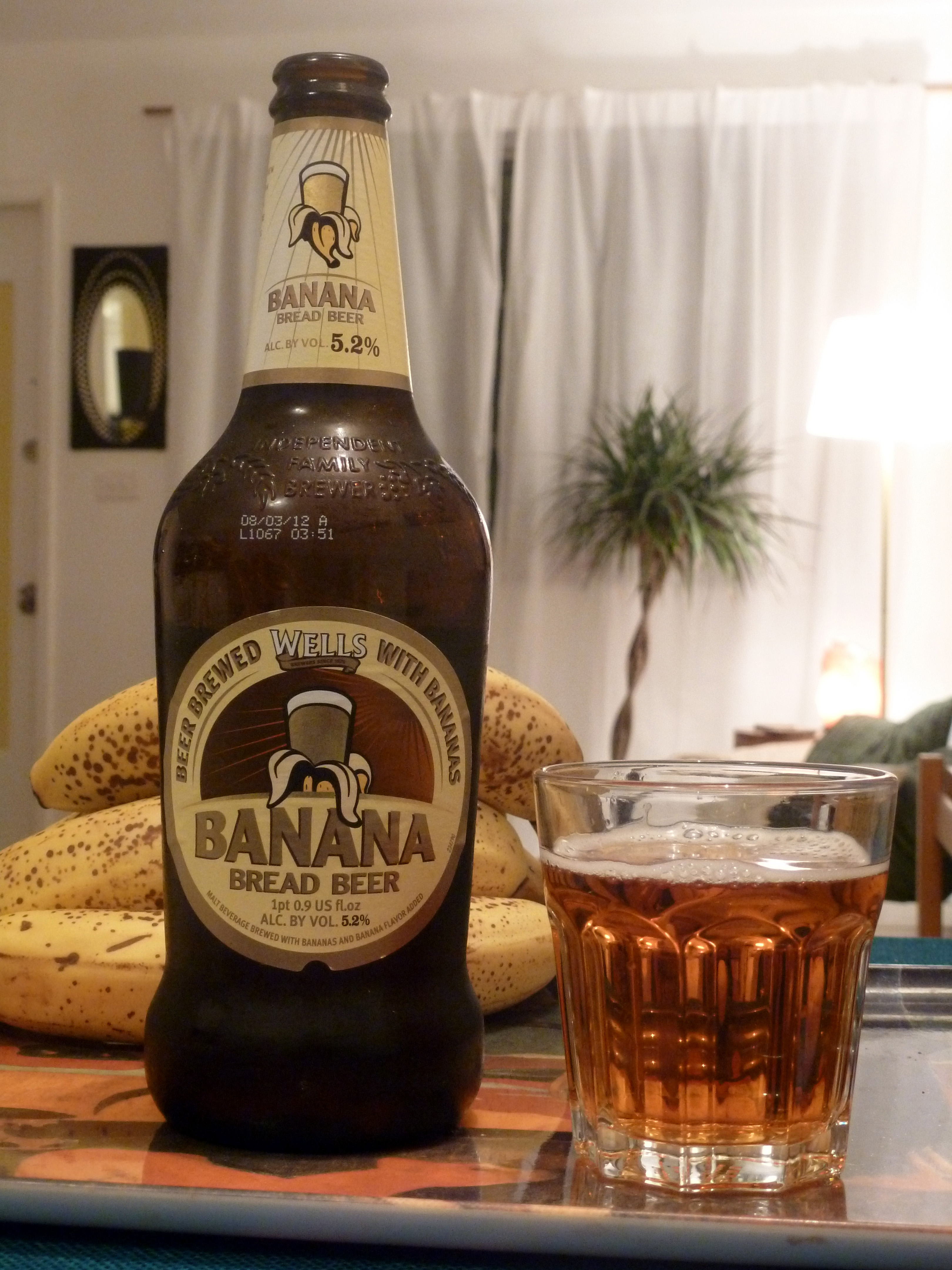 Banana Bread beer